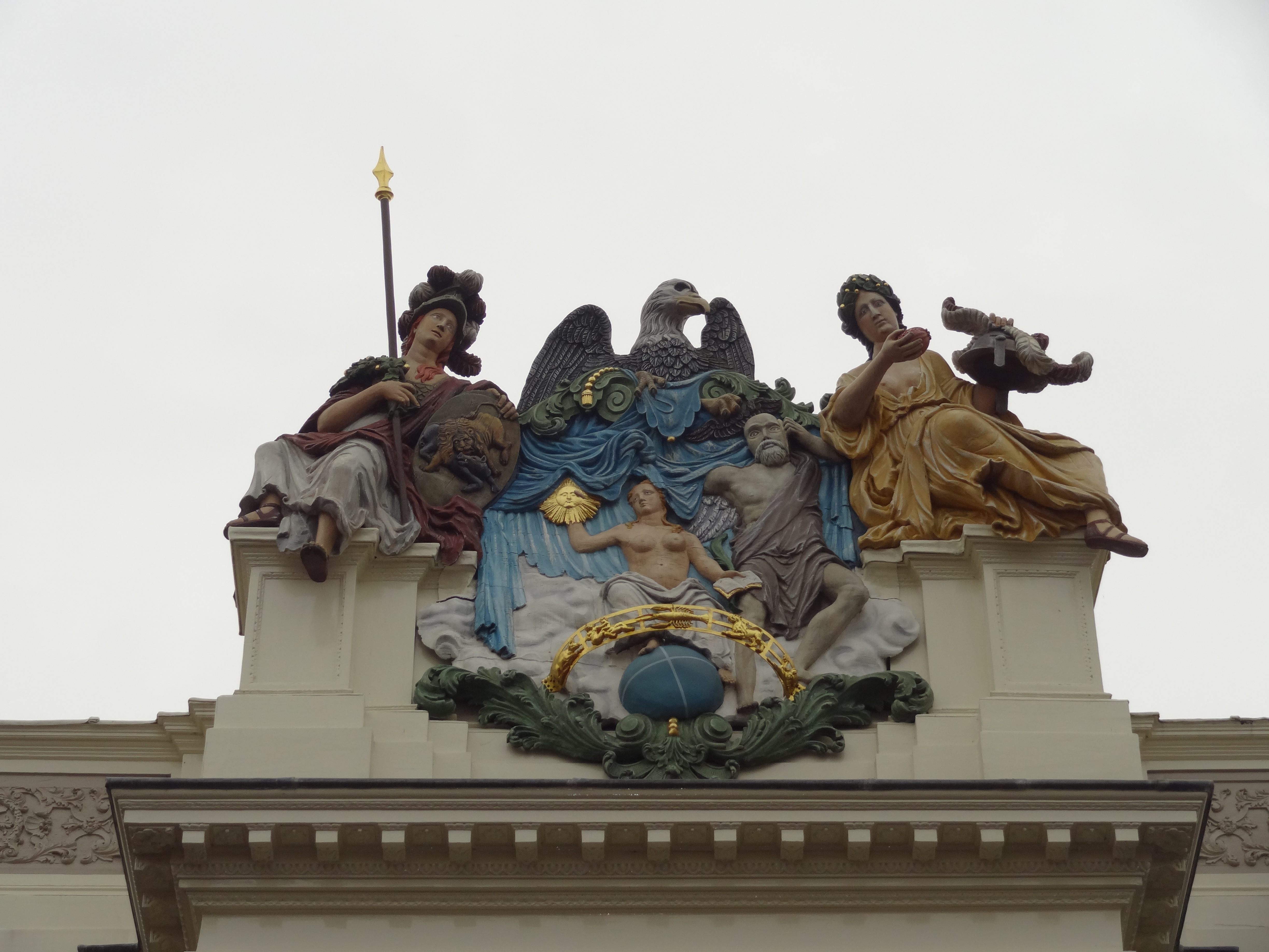 Sculptuur op de gevellijst van de Moriaanshoofd